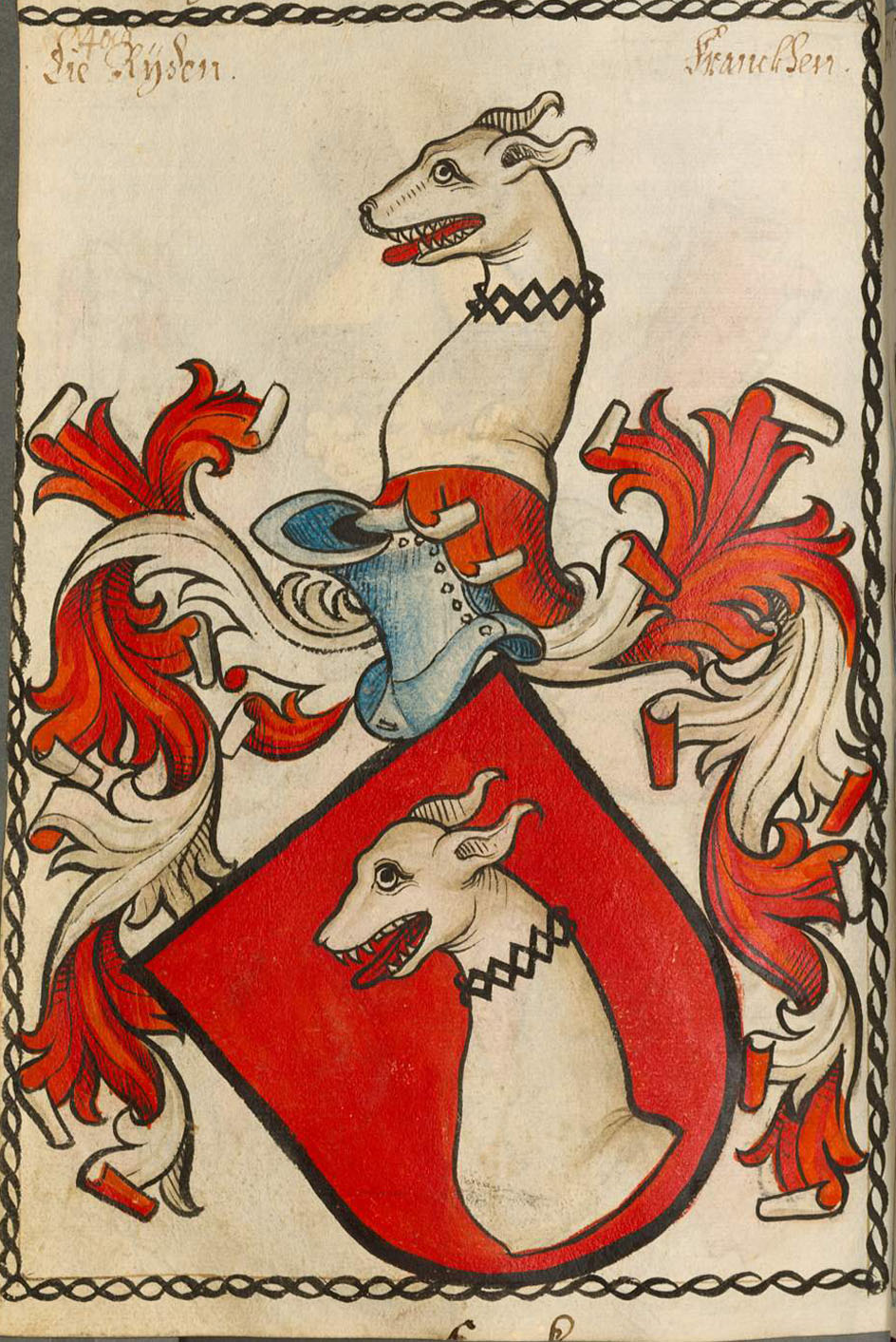 Scheibler'sches Wappenbuch, älterer Teil Die Ryden Franckhen Wappen der Familie Freiherren Rüdt von Collenberg.